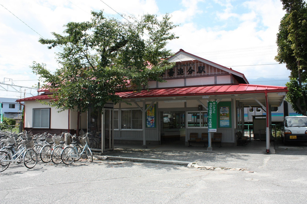 JR大糸線安曇追分駅・駅舎